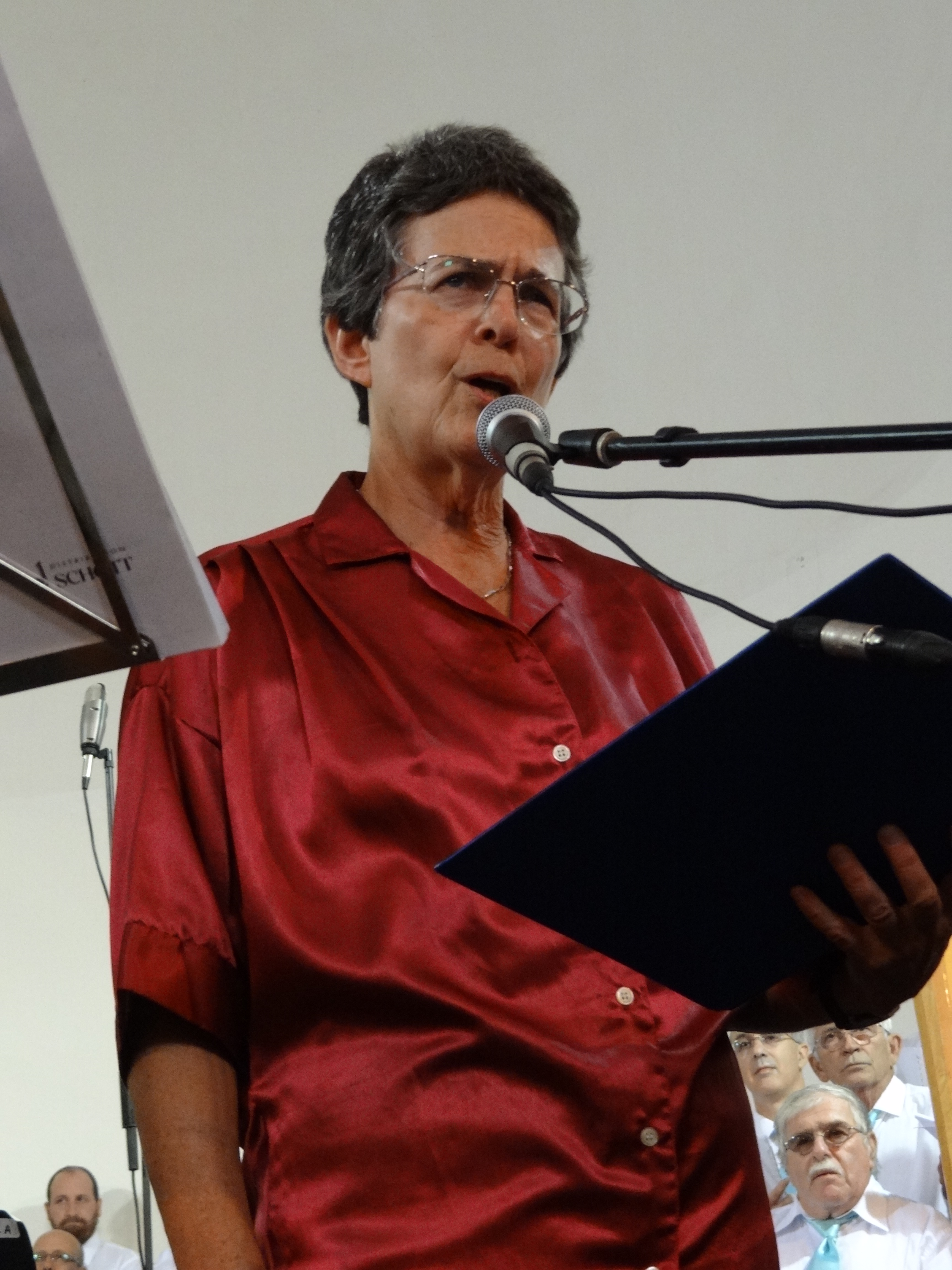 השדרנית חיותה דביר בפסטיבל אבו גוש